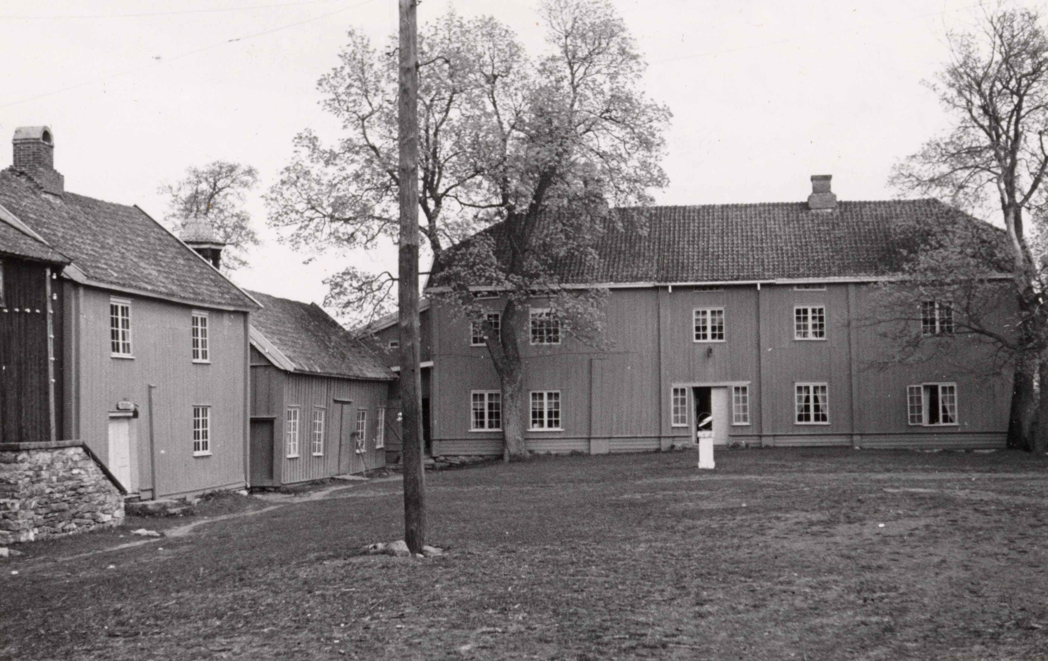 Stenberg i Vestre Toten, Oppland